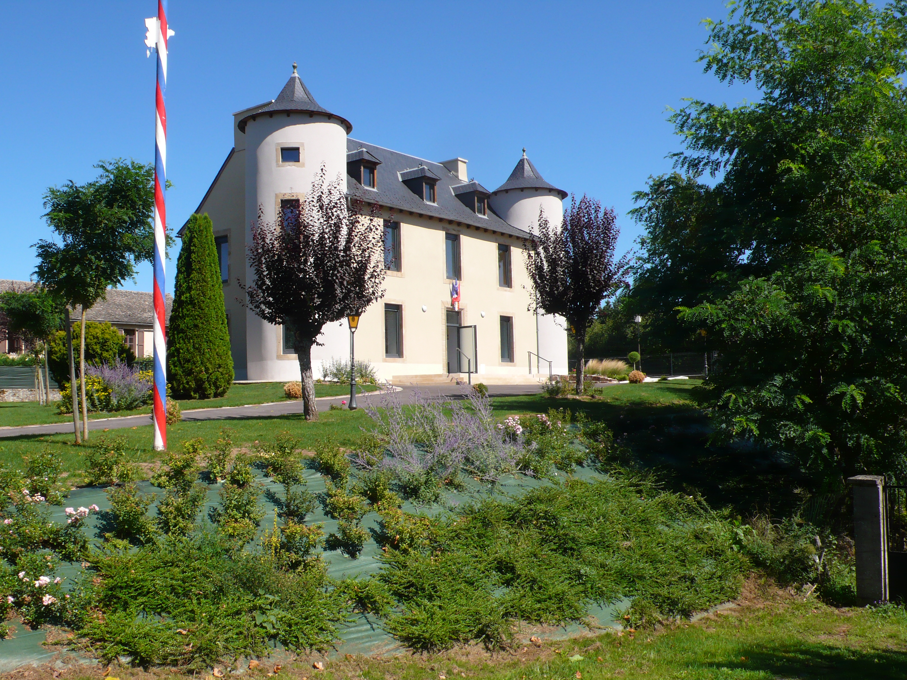 Mairie d'Arvieu (Aveyron, France), restaurée en 2014.